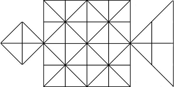 虎棋棋盤的一種。